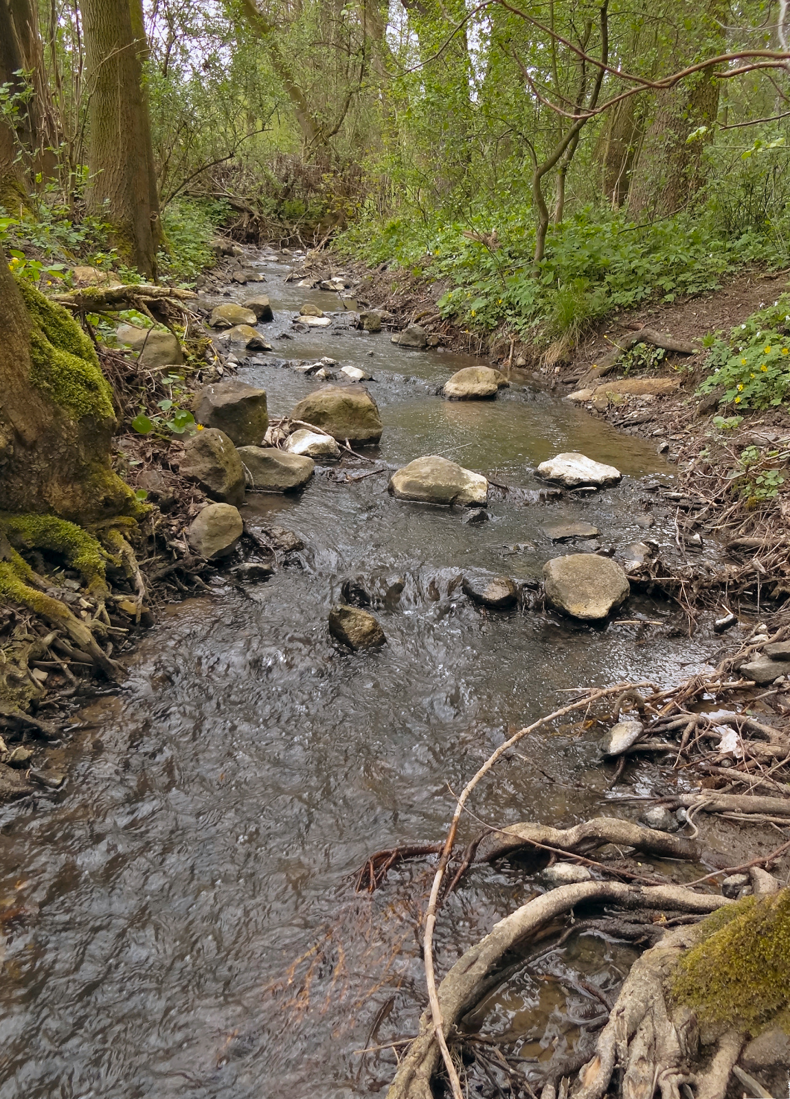 Horní tok Kuzovského potoka pod Starým